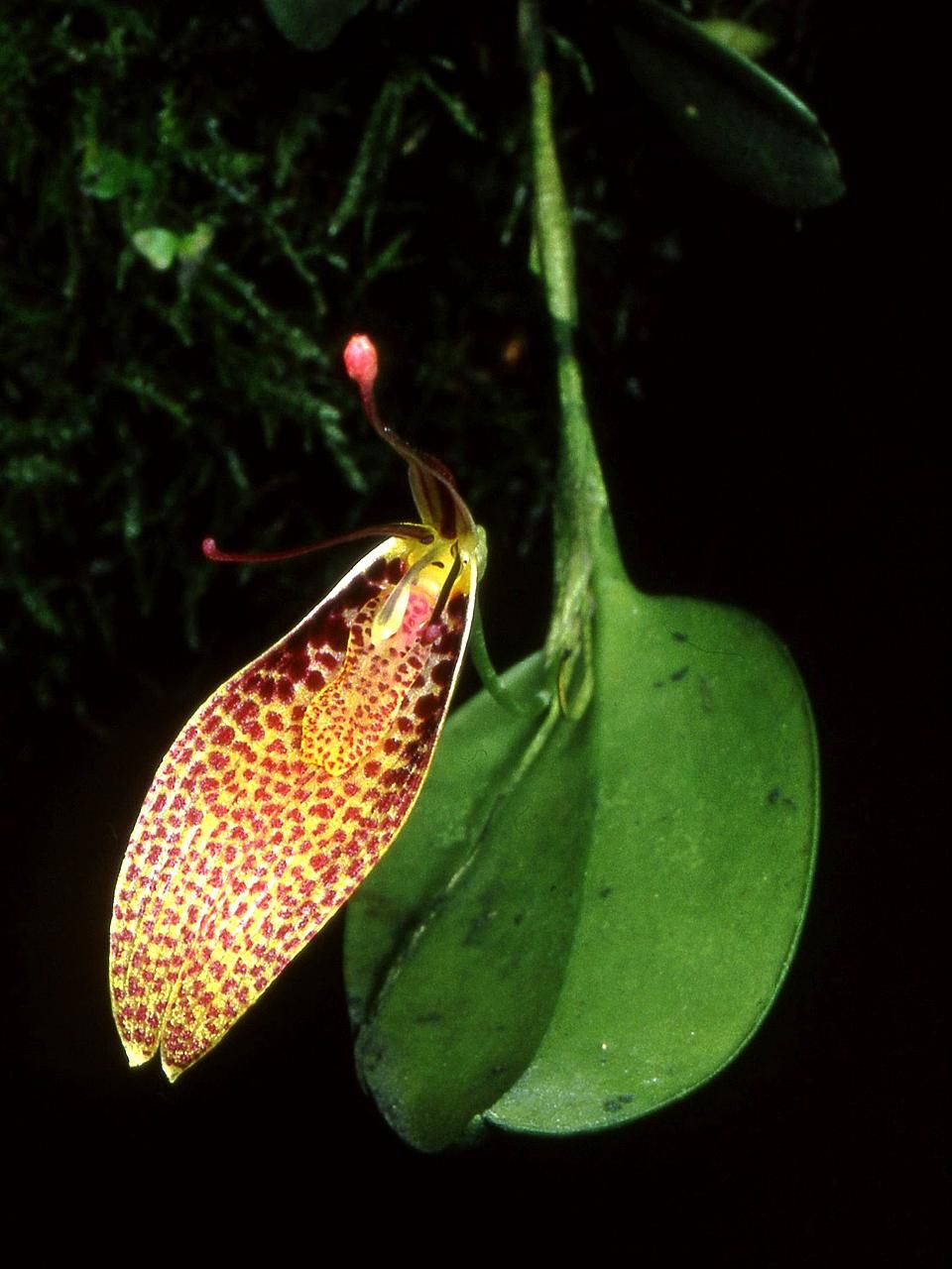 Restrepia guttulata - flower